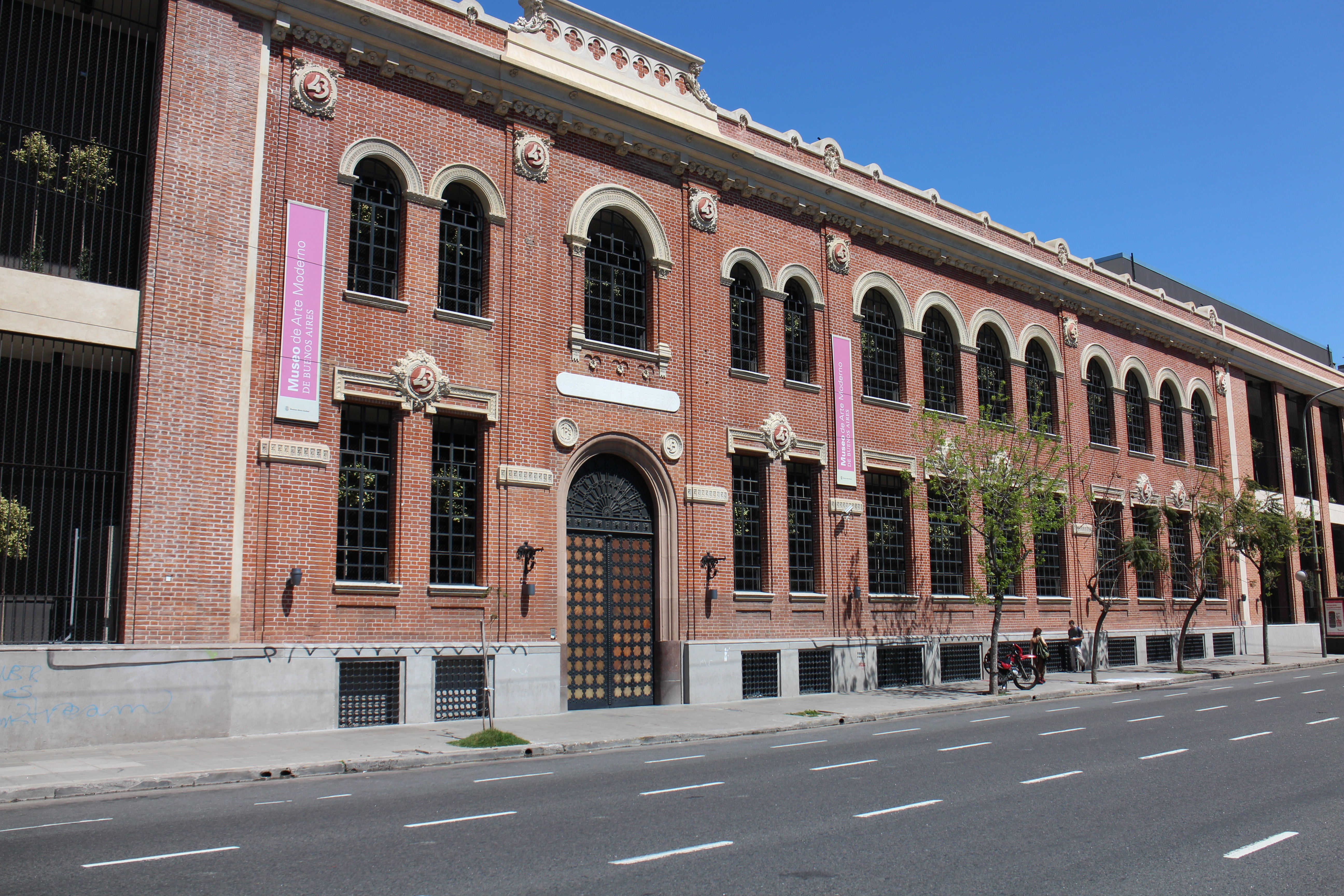 Museo de Arte Moderno de Buenos Aires, San Telmo, Ciudad Autónoma de Buenos Aires.